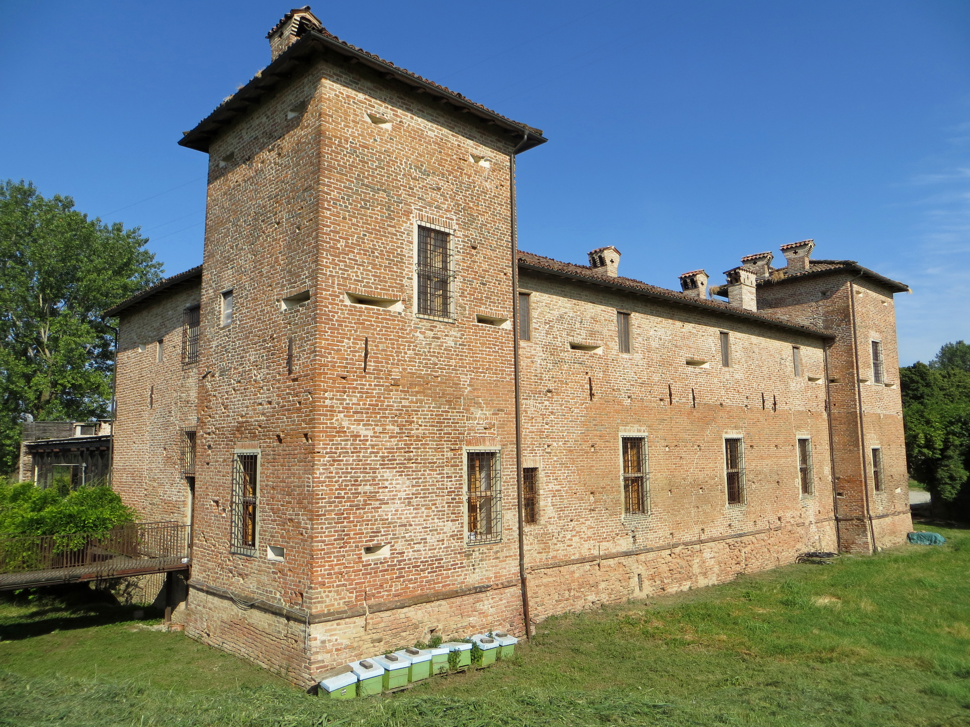 Antica Corte Pallavicina (Polesine Parmense) - facciata posteriore e lato nord